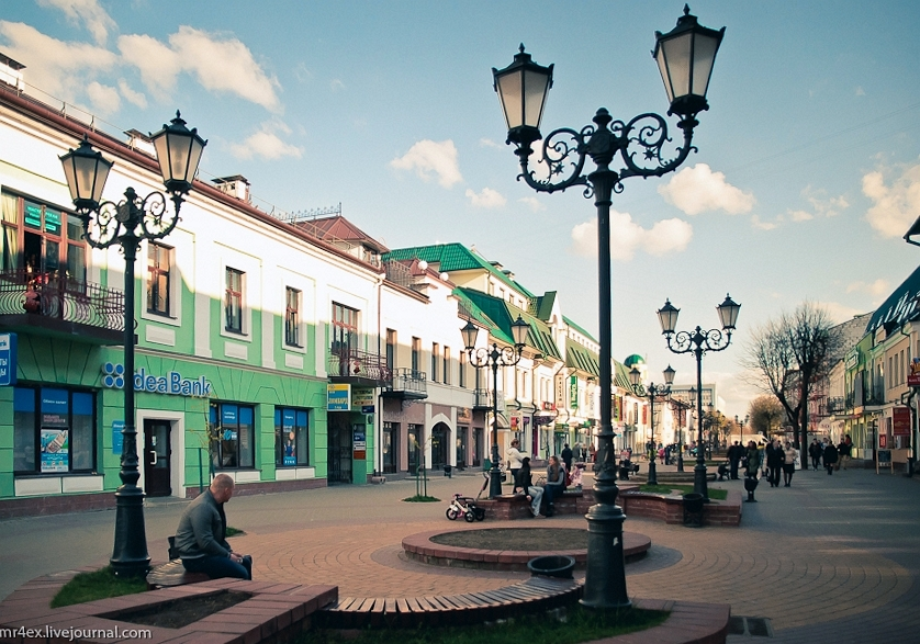 Брэст. Савецкая вуліца